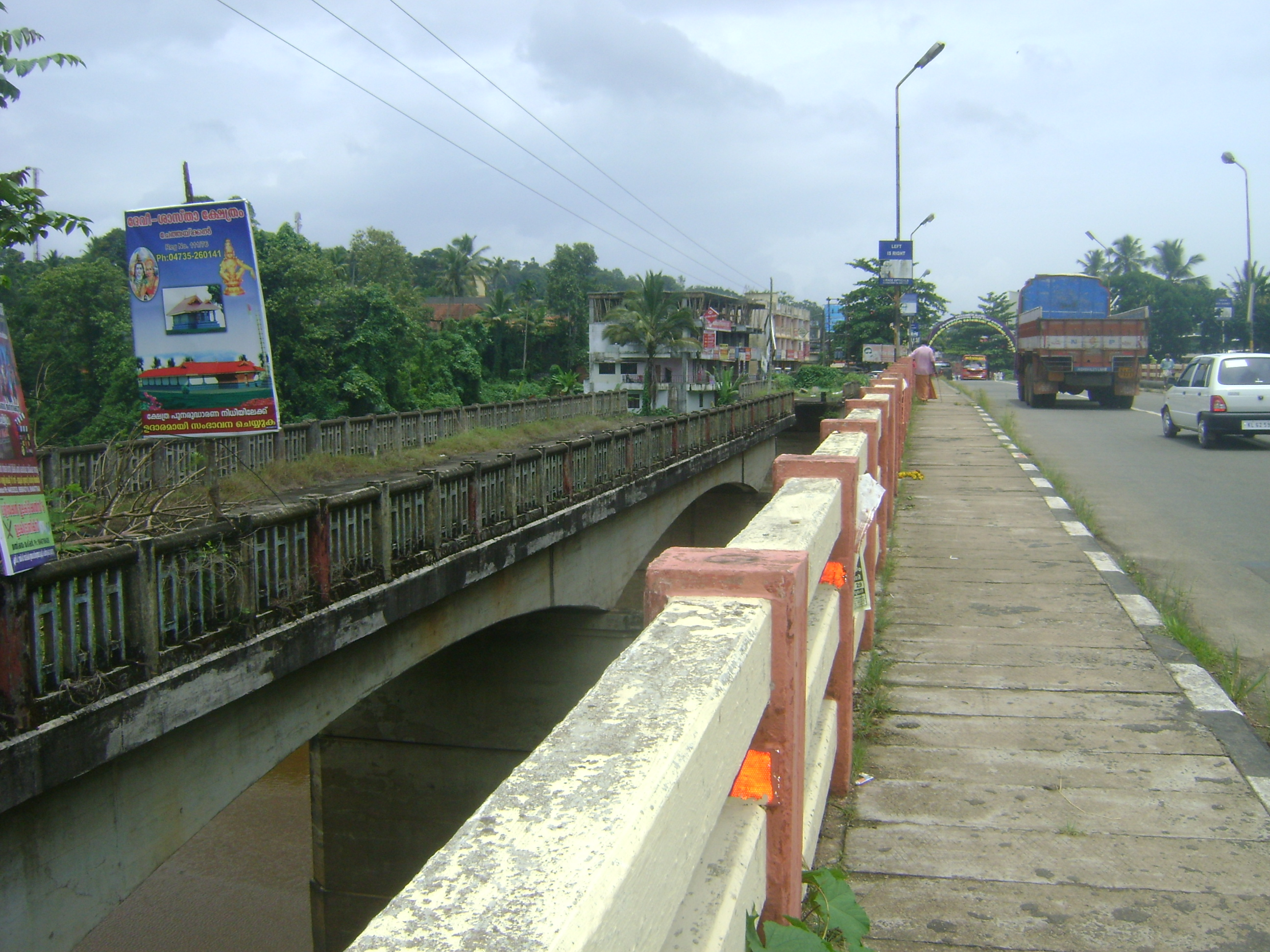 പുതിയ പാലവും തകർന്ന പാലവും